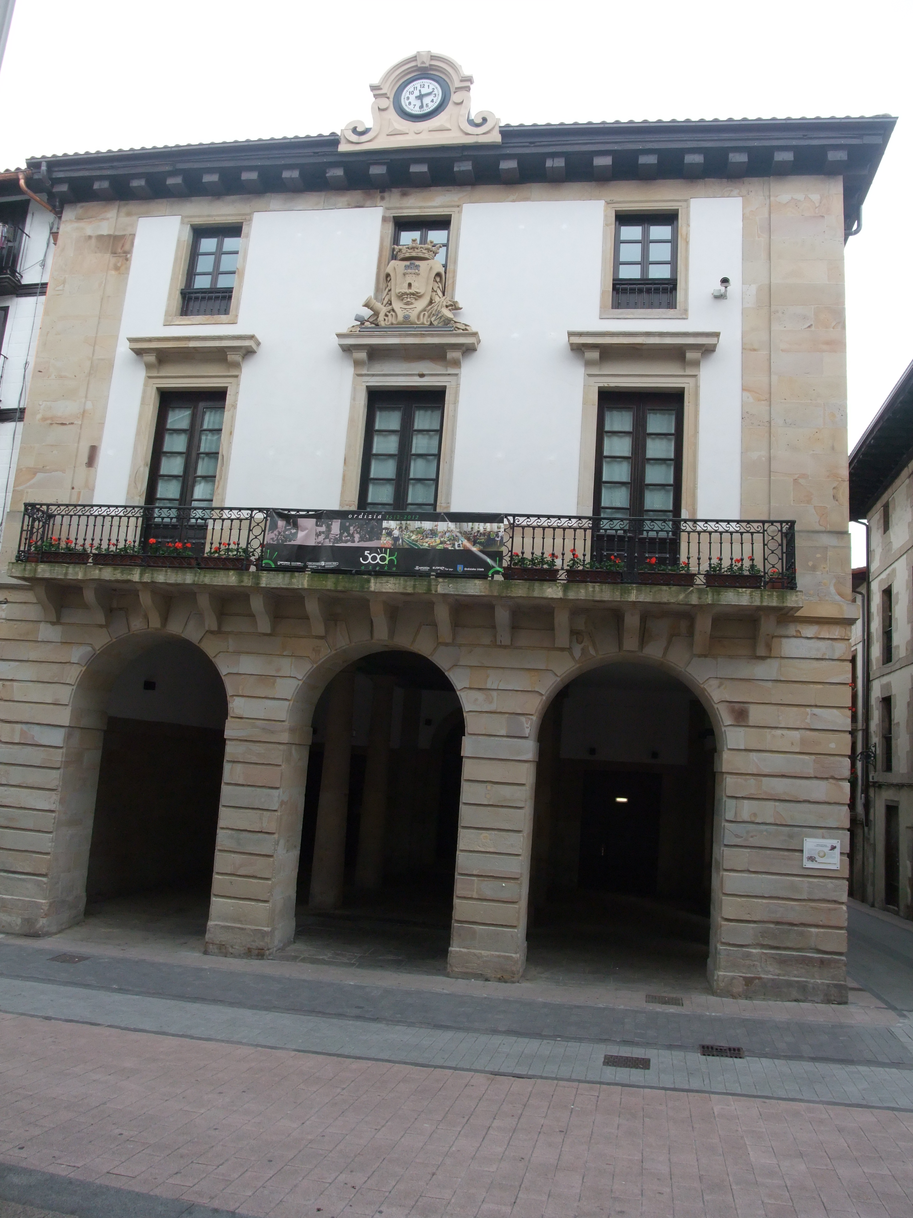 Ordizia (Guipúzcoa)-Ayuntamiento-1